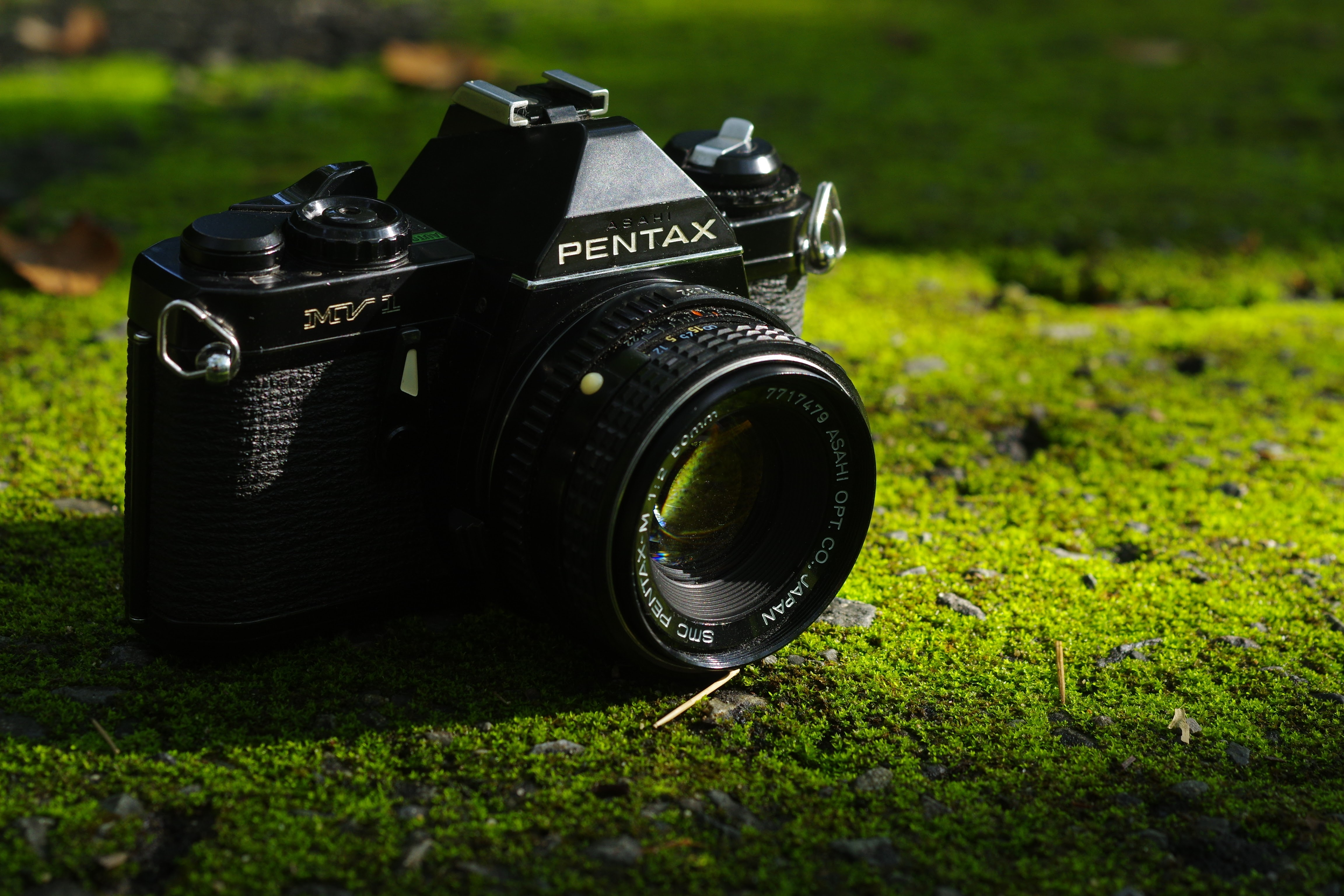 PENTAX MV1 with smc PENTAX-M 50mm F2